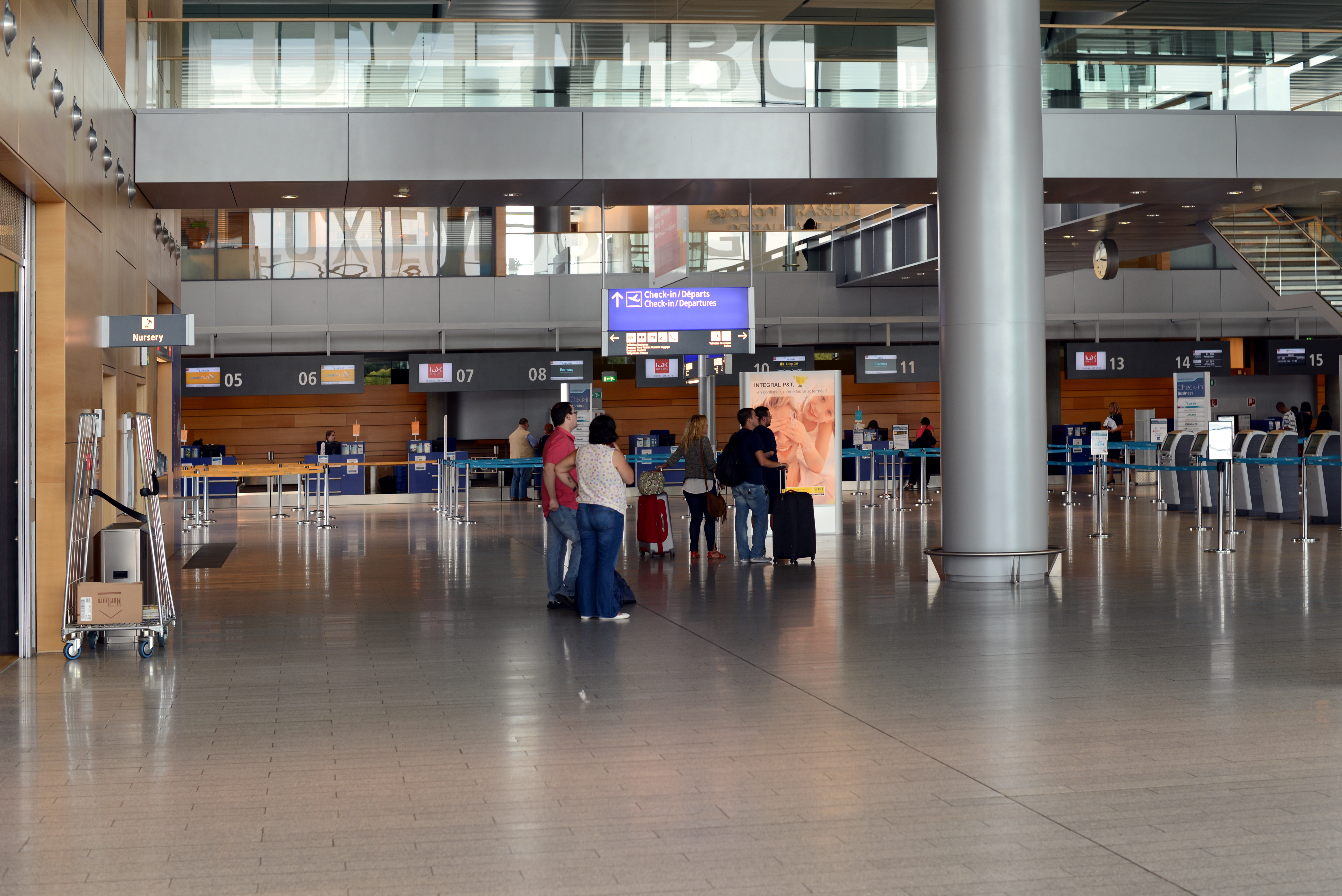 Fluchhafe Lëtzebuerg: Den Hall des départs am Terminal A.